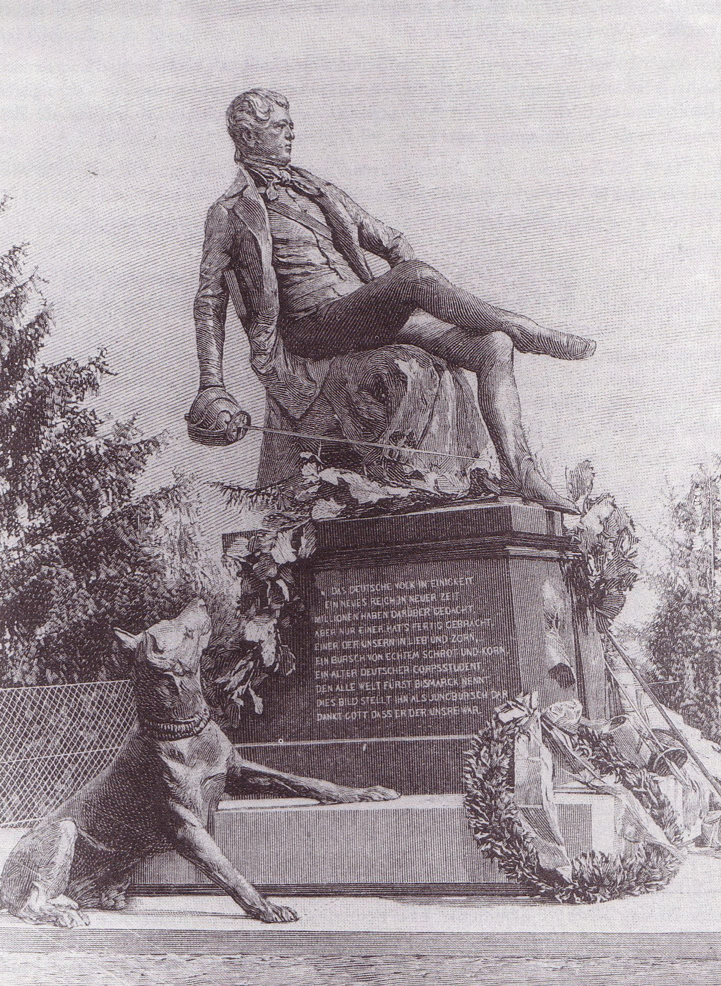 Mit dem Einverständnis Otto v. Bismarcks errichtete der KSCV 1896 das Denkmal bei der Rudelsburg. Es zeigt den jungen Corpsstudenten v. Bismarck mit dem Schläger und seiner Dogge. Nach Fotografien wurde das Jung-Bismarck-Denkmal in der DDR zwischen dem 3.5.1951 und dem 10.5.1952 zerstört. Es wurde fünfzig Jahre später neu gegossen und am 1. April 2006 enthüllt.